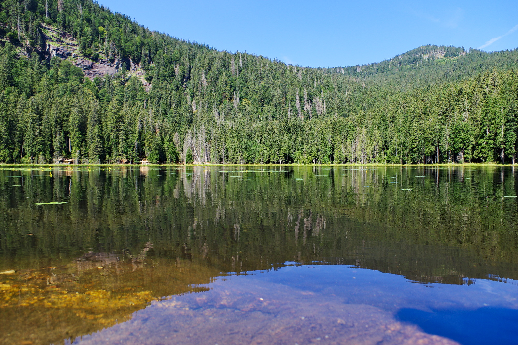 Blick vom Ufer auf den Großen Arbersee mit Reflektionen auf der Wasseroberfläche